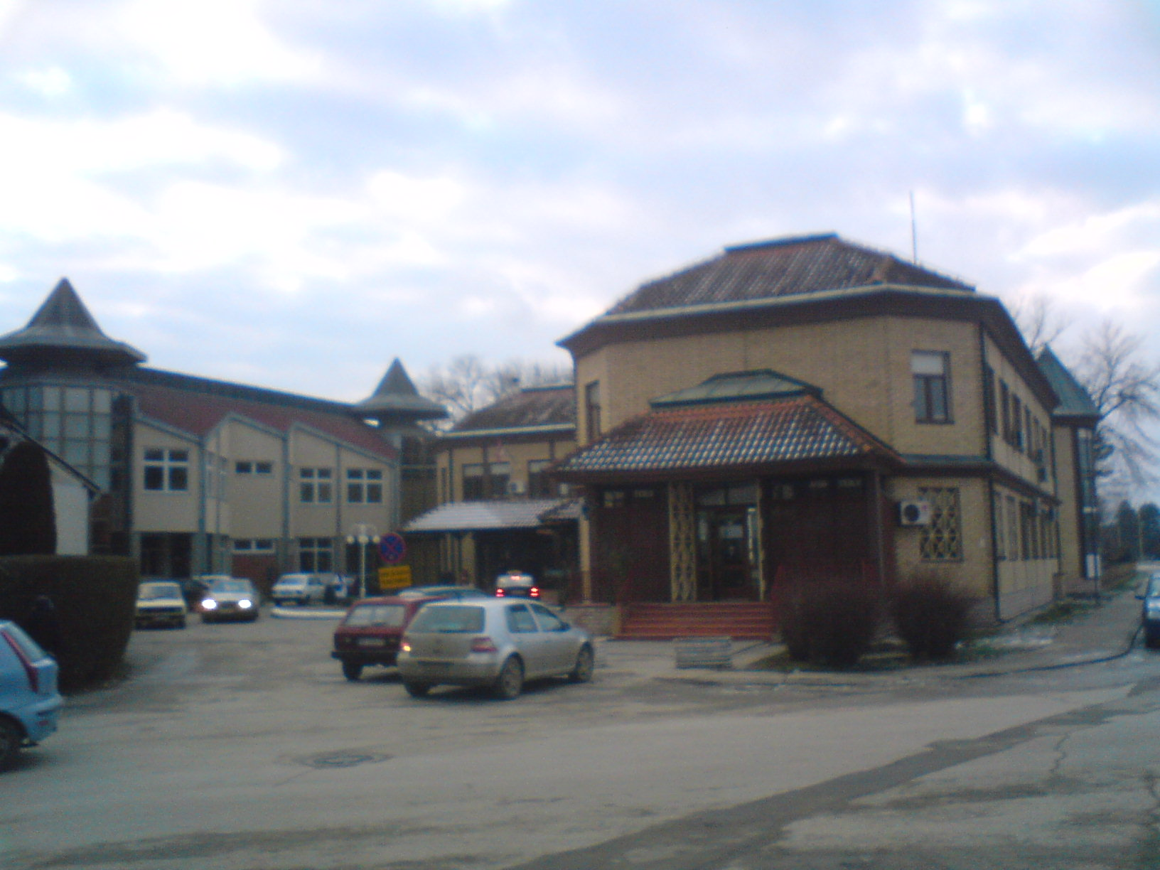 Дом здравља у Баточини.